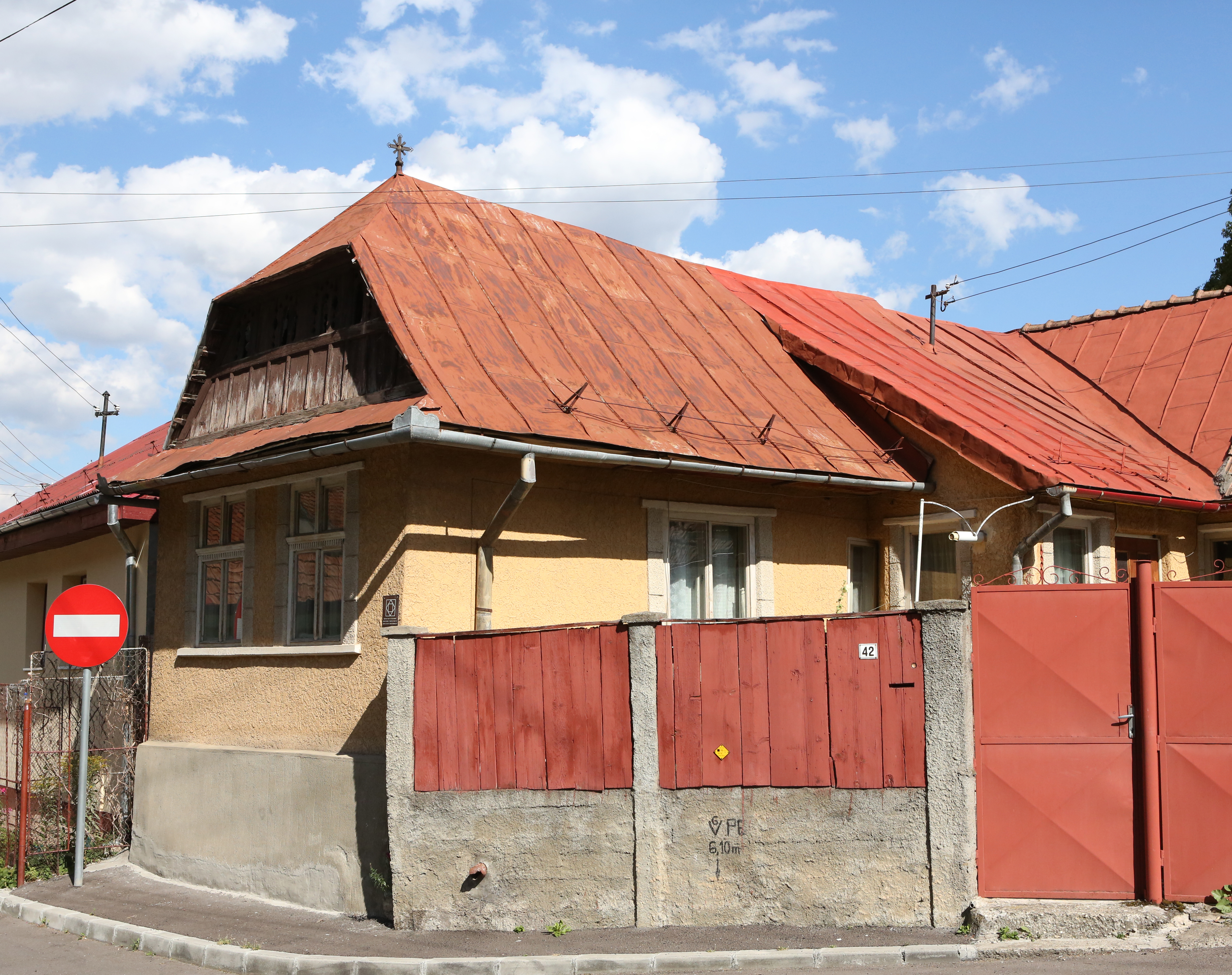 Casă (corp A)